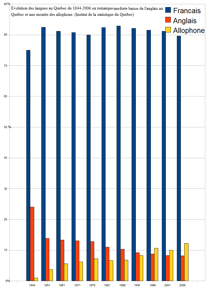 Évolution de la situation linguistique au Québec entre 1844 et 2006